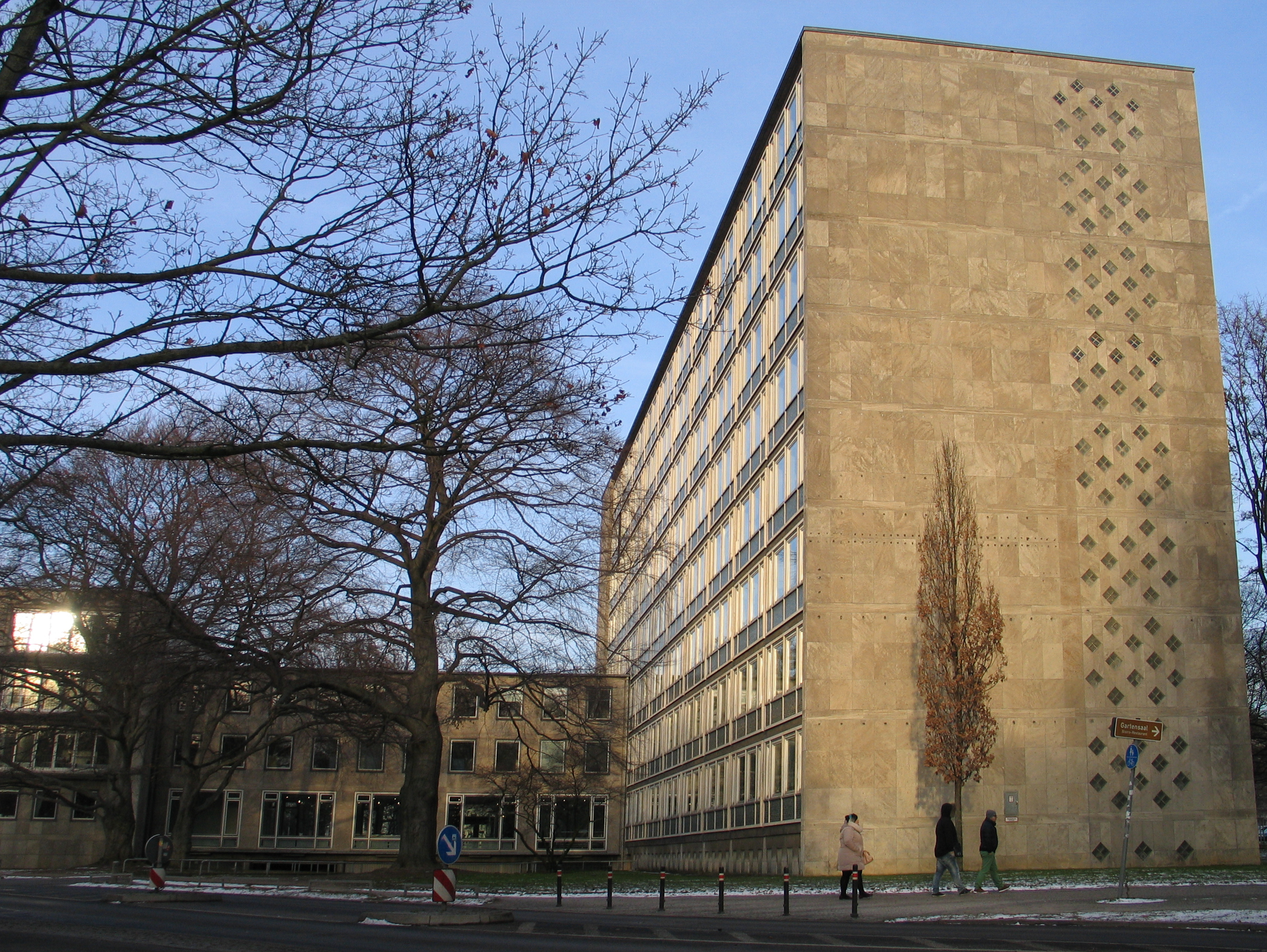 Die Bauverwaltung von Hannover, Sitz des Baudezernenten, dem städtischen Denkmalamt ...; gesehen von der Culemannstraße ...